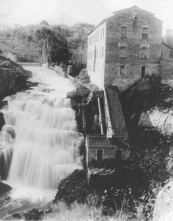 Moinho de Aristides Germani.